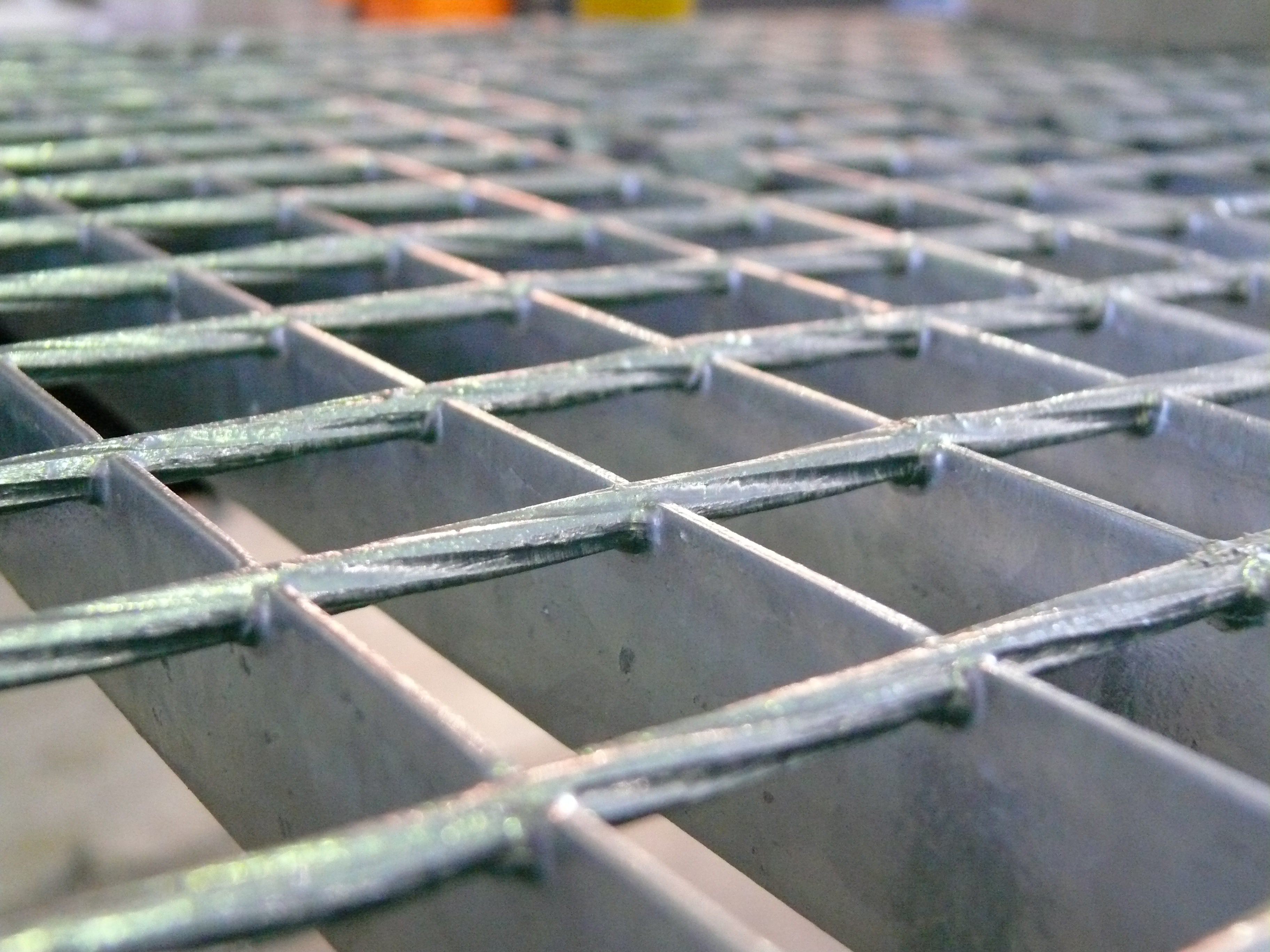 Зварний решітковий настил з несучою смугою 30х2 мм та поперечним прутком діаметром 5 мм